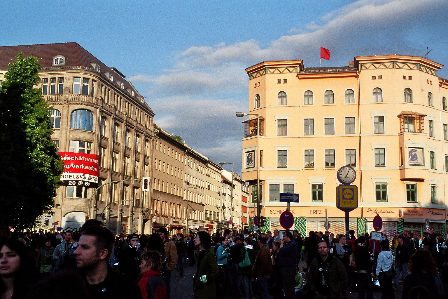 Mayday in Berlin-Kreuzberg Oranienplatz